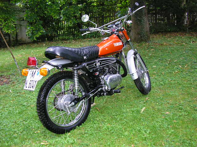 Yamaha Enduro 125 E DT Bj. 1972